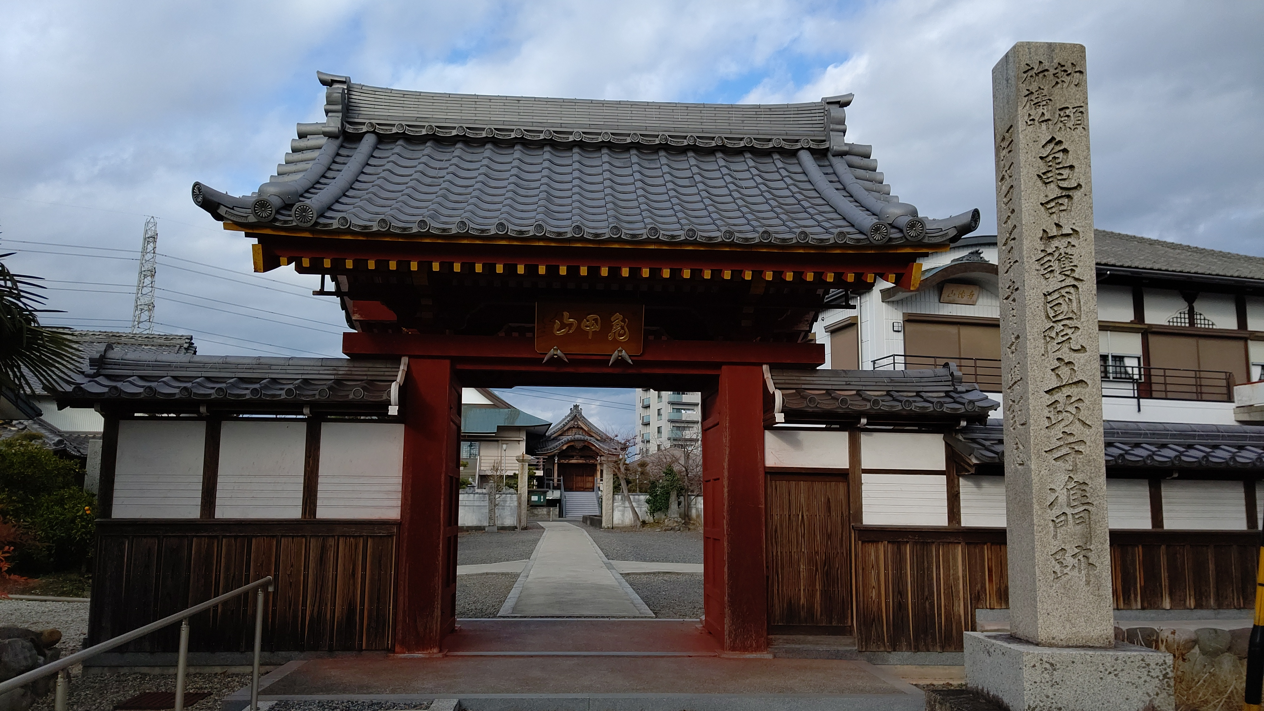 二条師良の号で菩提所「是心院」があった立政寺（岐阜県）